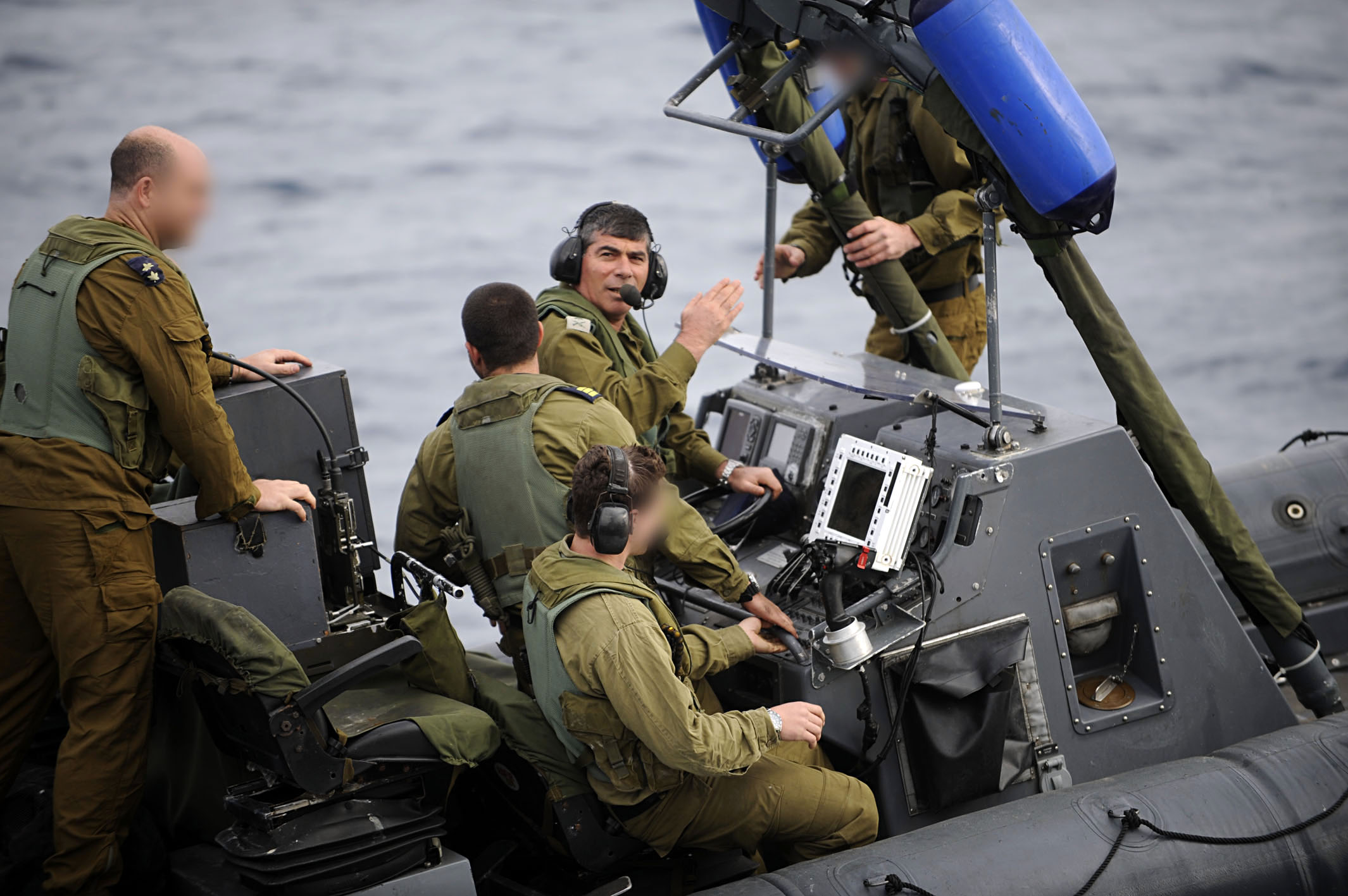 January 19, 2011. The Chief of the General Staff, Lt. Gen. Gabi Ashkenazi, visits the Israeli Navy as part of his final visits to all IDF branches and units. As part of his visit, Lt. Gen. Ashkenazi met with the crews of missile boats and set sail with them, after which he continues aboard a "Morena" boat to the Naval Commando Unit base. במסגרת סבב ביקורי הפרידה מצה"ל, ביקר היום (ד') הרמטכ"ל, רב אלוף גבי אשכנזי, בבסיסי חיל הים. כחלק מהביקור נפרד הרמטכ"ל משייטת ספינות הטילים ויצא עימם להפלגה, אחריה המשיך על גבי סירת "מורנה" אל בסיס הקומנדו הימי.